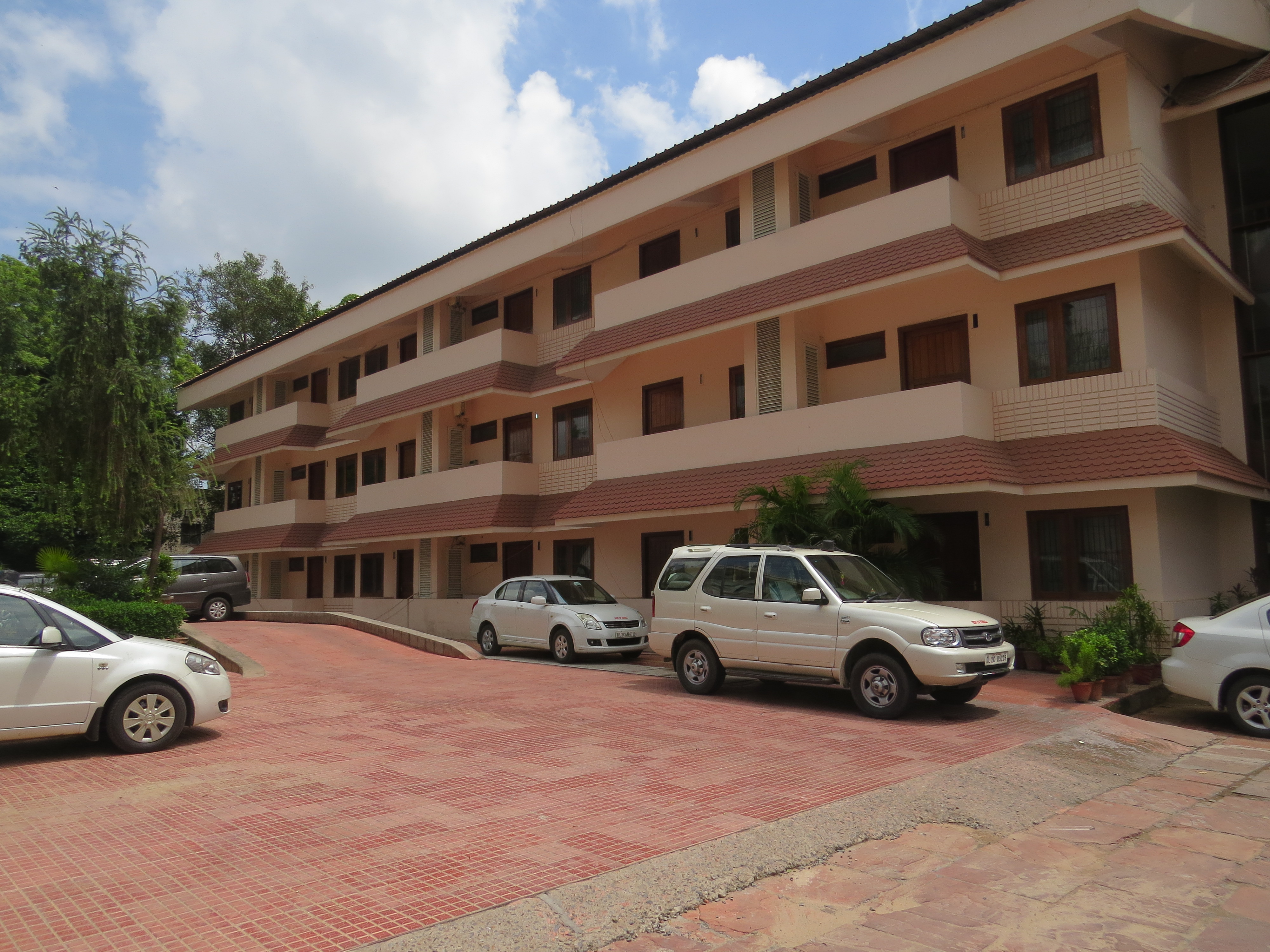 Photos taken during WCI, Chandigarh 2016